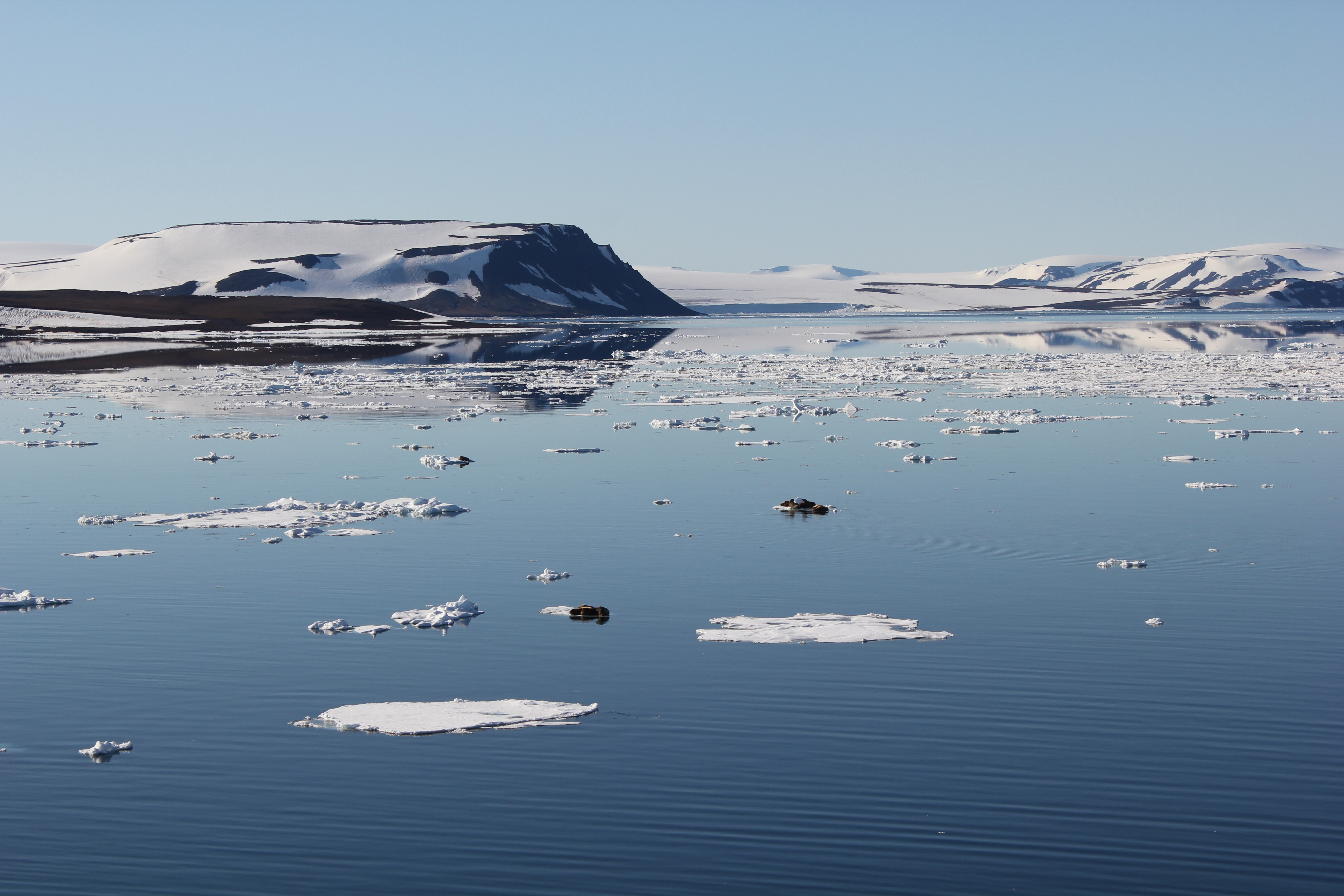 Комплексный заказник Земля Франца-Иосифа: Архангельск,Приморский район, Архангельская область This image is related to the protected area of Russia number 2930163